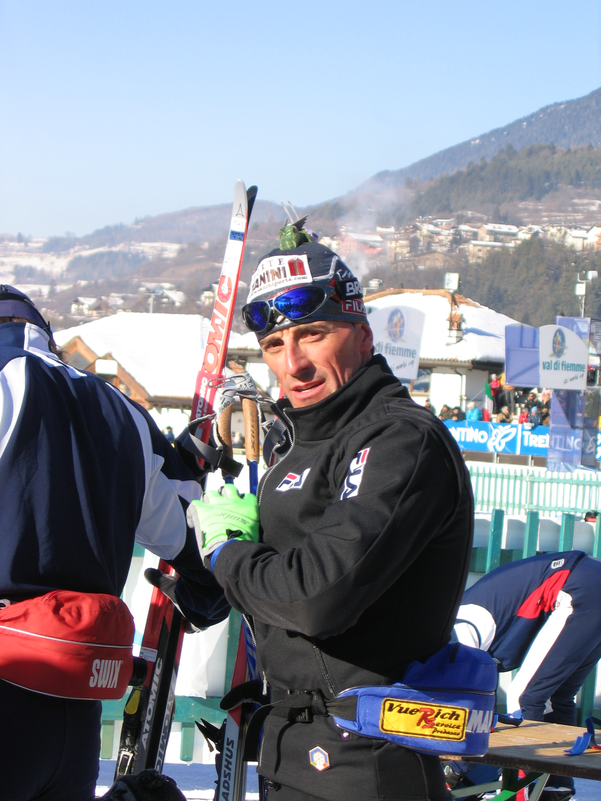 Italian skier Fulvio Valbusa at Lago di Tesero Cross-Country Ski Stadium.